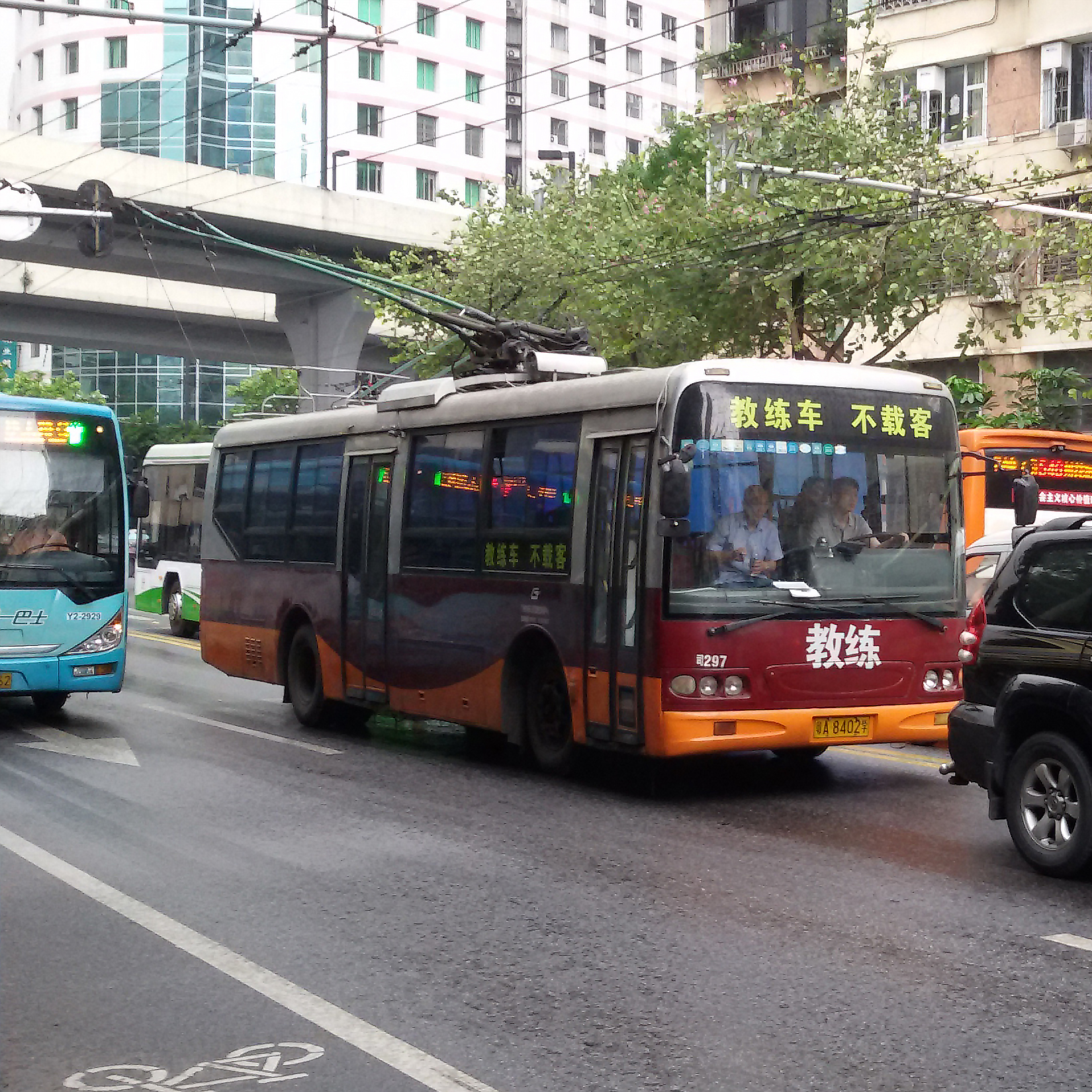 粵語: 广州喺1999~2013年用过嘅电车品种。